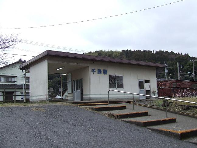 JR千路駅駅舎 }